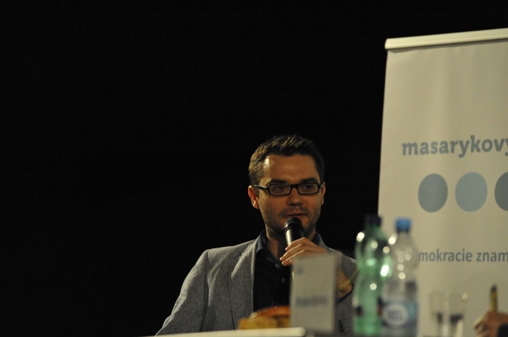 Stanislav Polčák v roce 2012